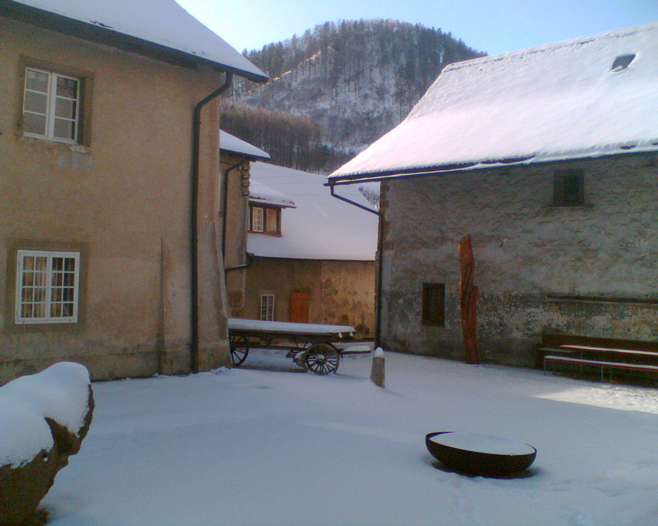 Stiftung Sculpture at Schoenthal, Kloster Schönthal, Schweiz